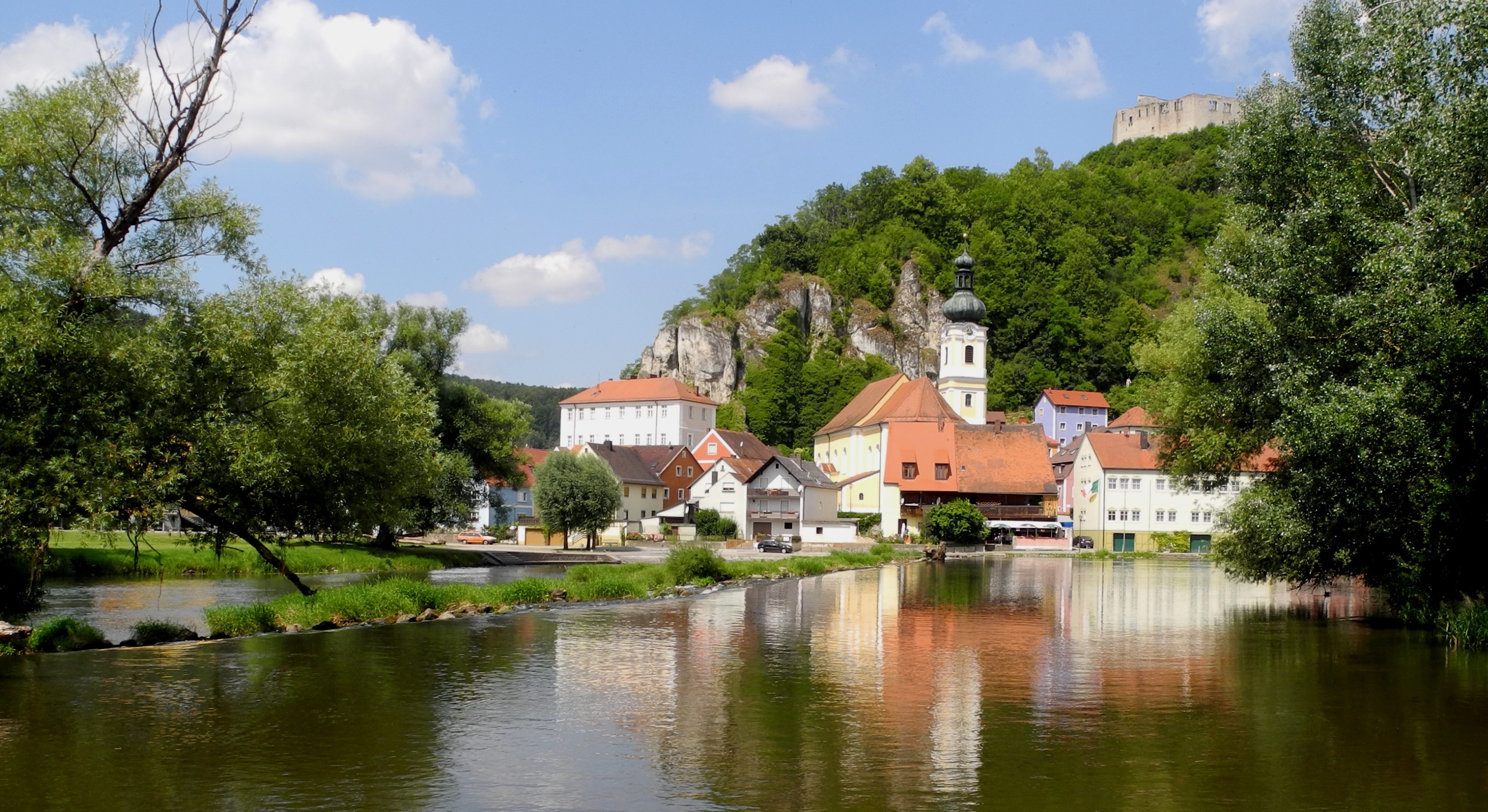 Kallmünz - Altstadt an der Naab